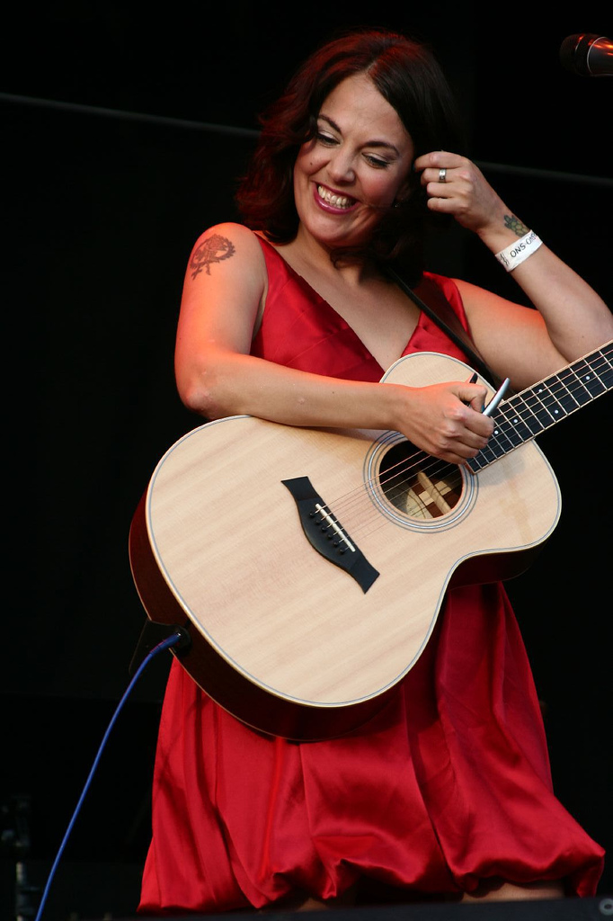 Marit Bergman performing live during Stockholm Pride 2007